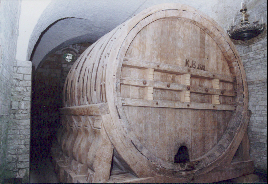 Das 1594 in Gröningen erbaute Fass ist heute das älteste erhaltene Riesenweinfass der Welt. Es befindet sich im Jagdschloss Spiegelsberge, Halberstadt.